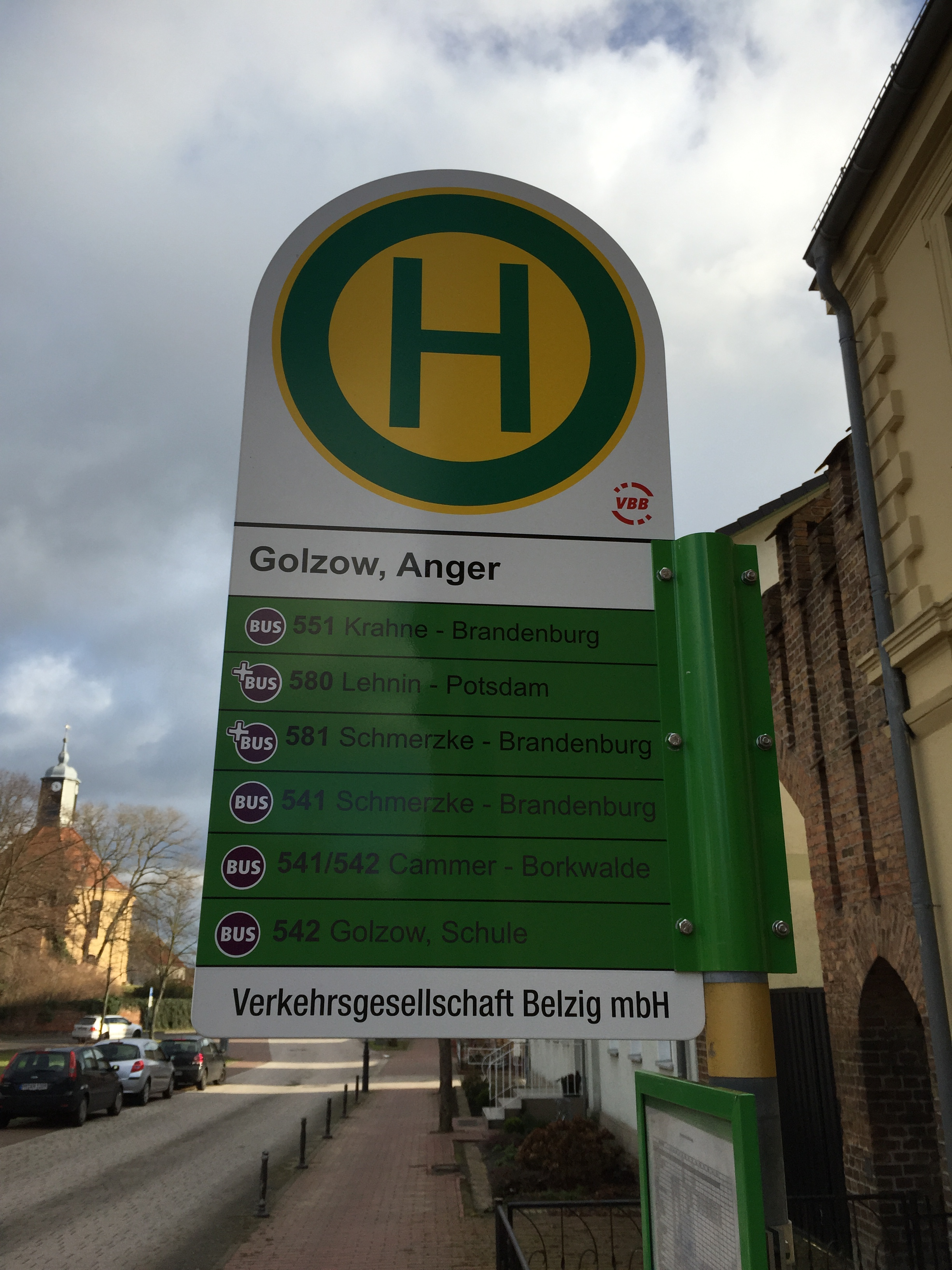 Ein Haltestellenschild der Verkehrsgesellschaft Belzig (Haltestelle Golzow, Anger). Zu erkennen sind PlusBus-Linien und normale Regionalbuslinien des Verkehrsverbundes Berlin-Brandenburg.